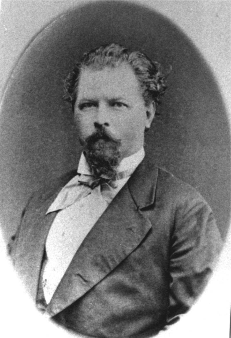 Додонов, Александр Михайлович